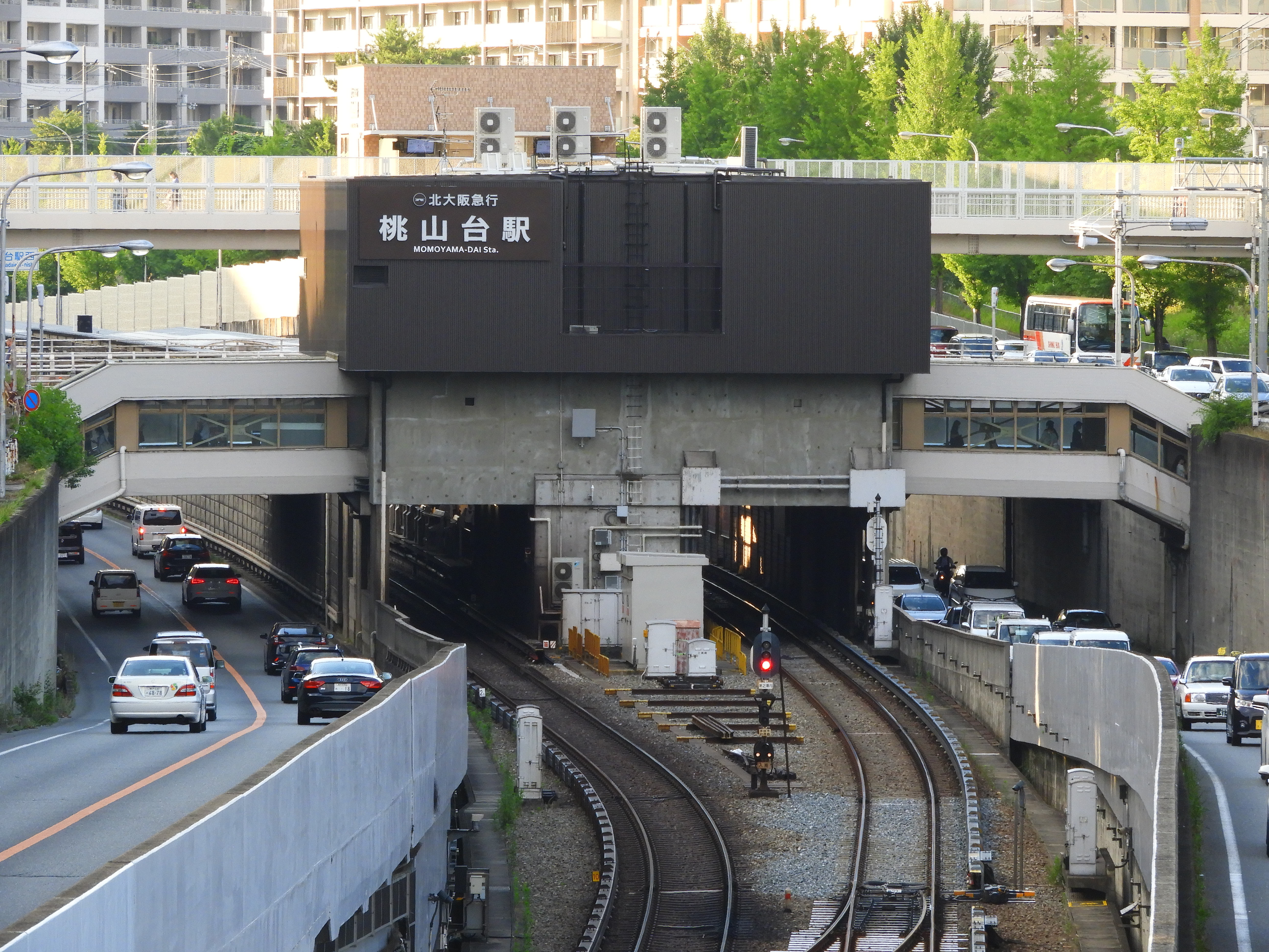 北大阪急行桃山台駅 リニューアル後駅舎 Nikon Coolpix B700